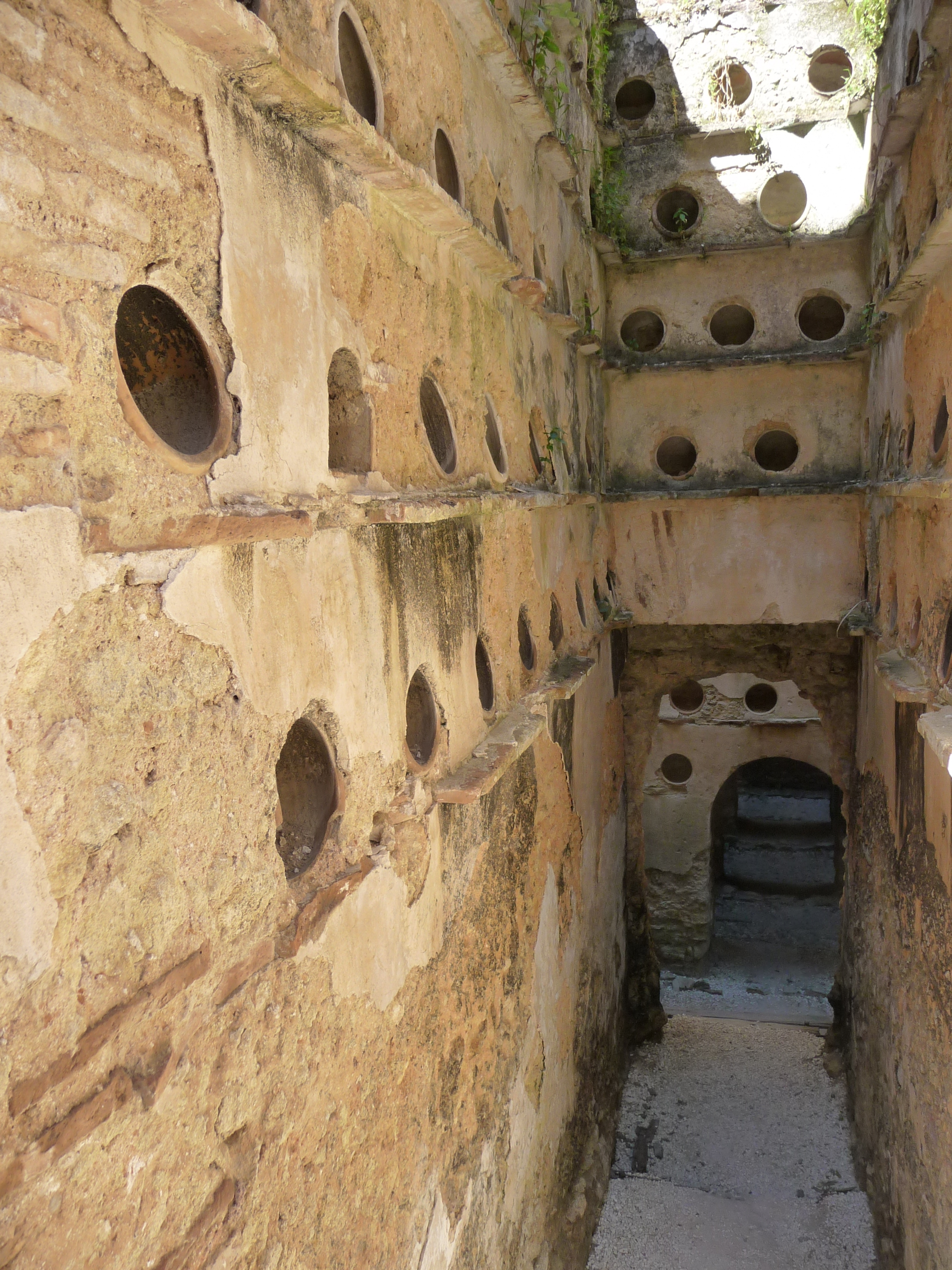 Palomar-BrennaBarbate-p1020174.jpg